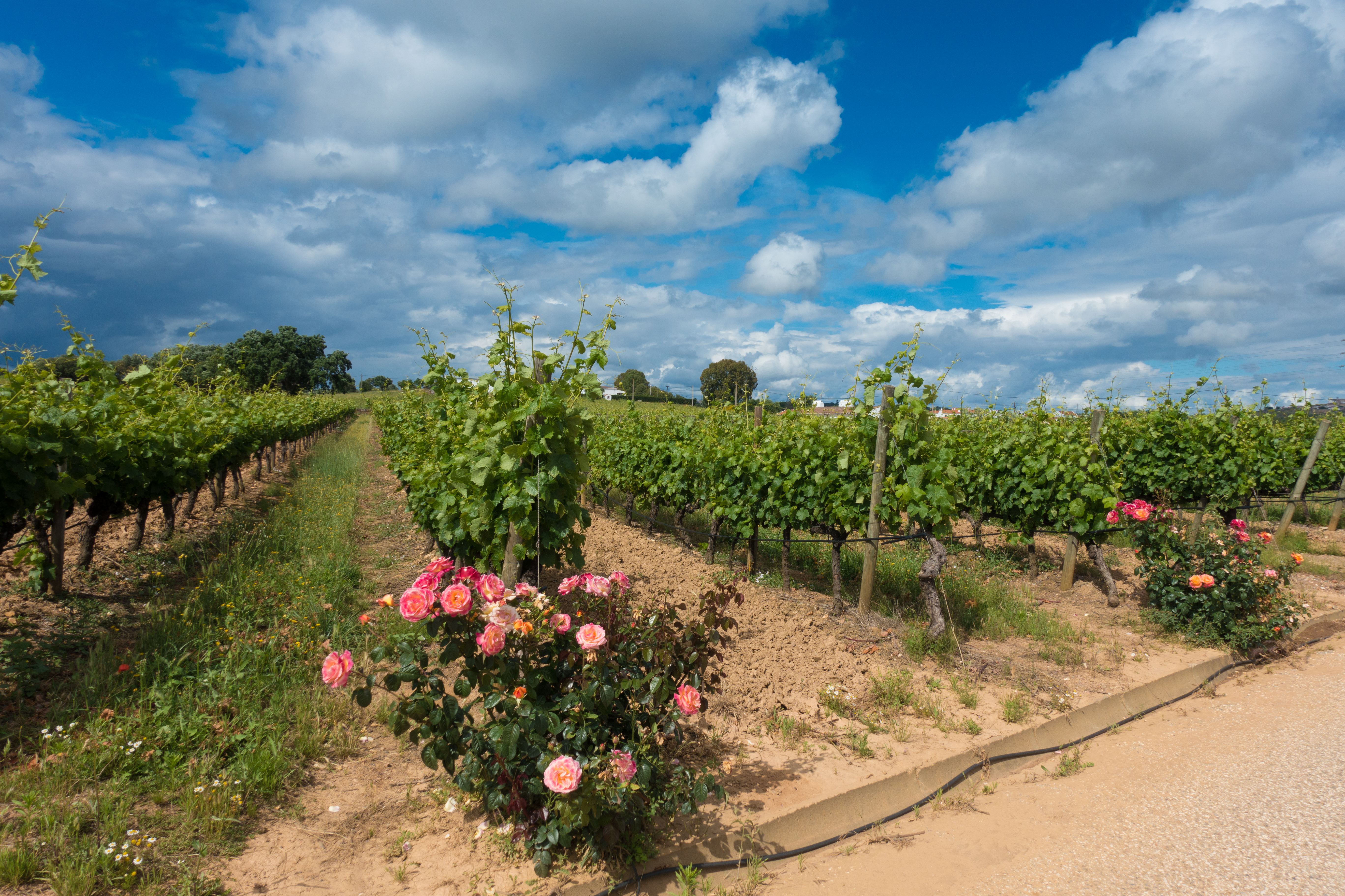 Alentejo